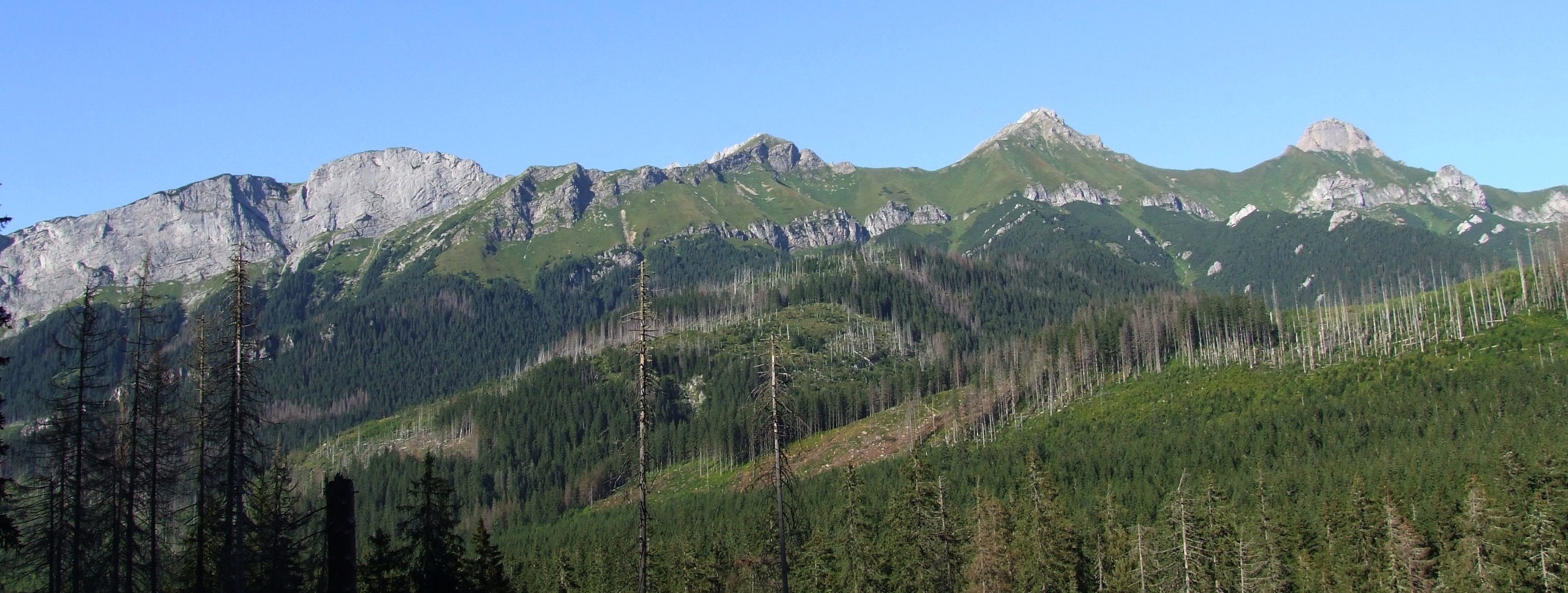 Widok na Tatry Bielskie z dolnej części Doliny Jaworowej. Od lewej: Murań, Nowy wierch, Hawrań, Płaczliwa Skała.